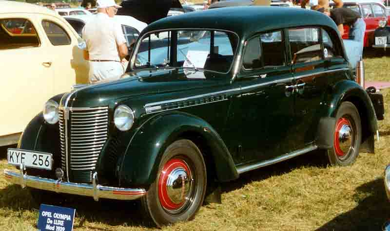 Opel Olympia De Luxe 4-Door Limousine 1939